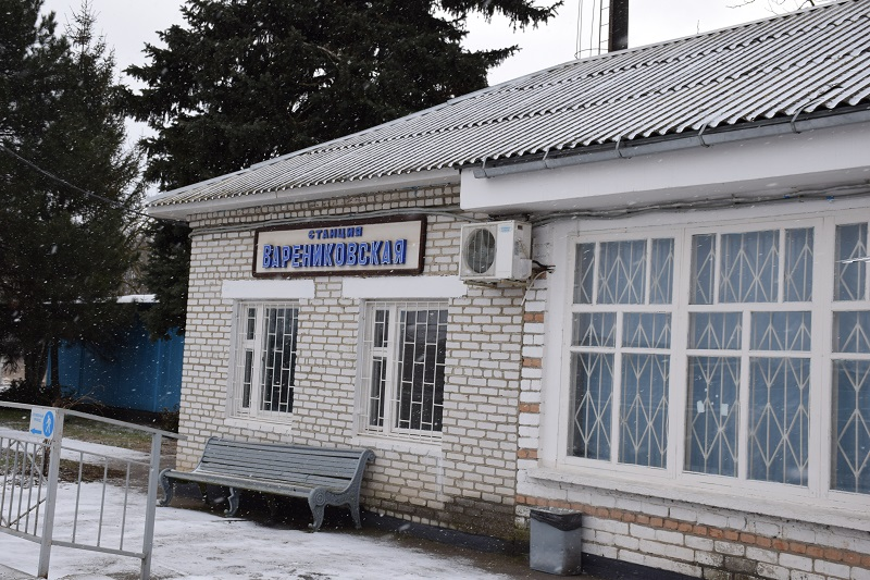 Фотография сделана в январе 2018 года